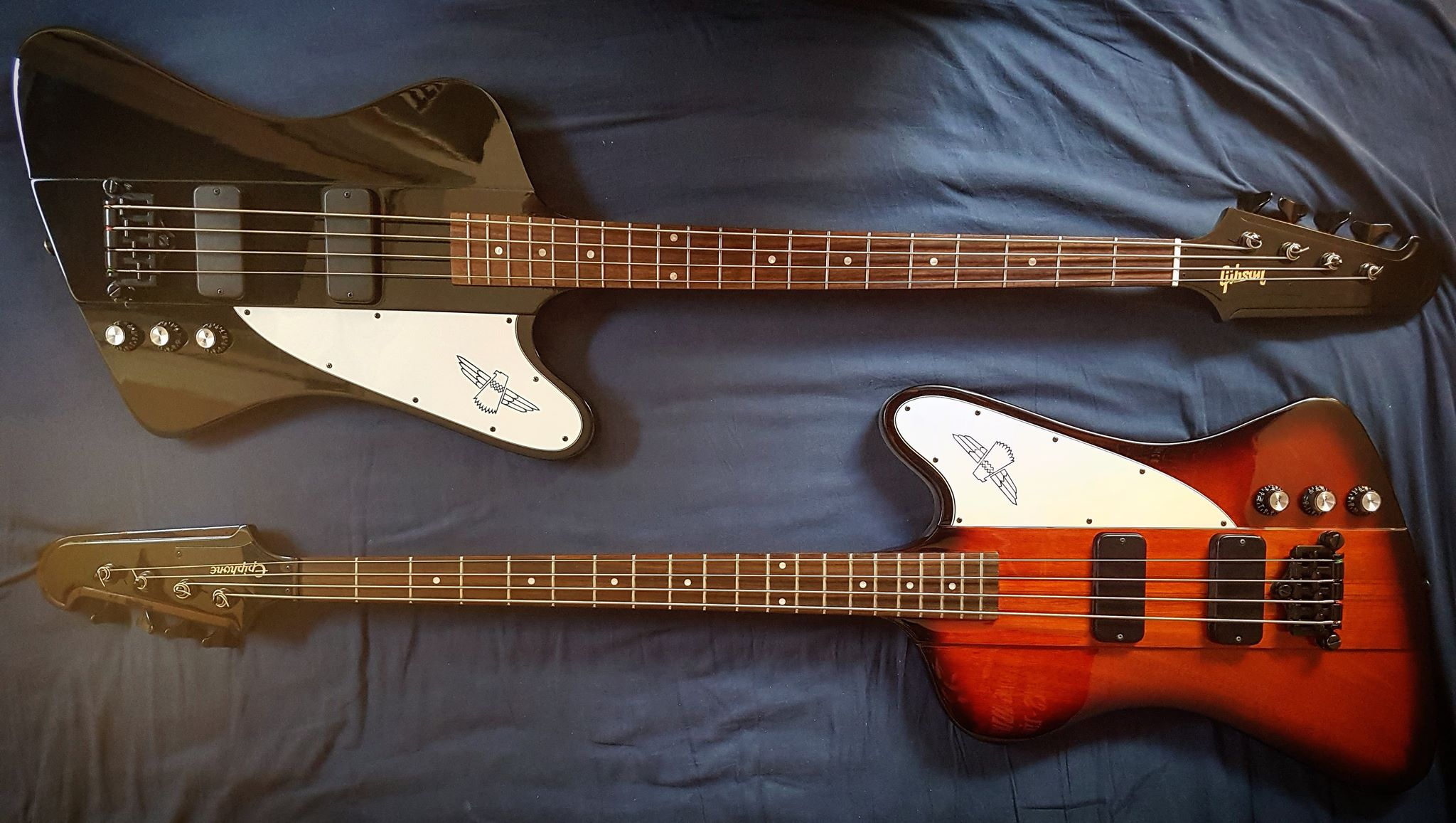 2013 Gibson Thunderbird ebony and a 2012 Epiphone Thunderbird Classic Pro sunburst